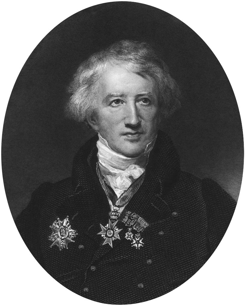 description: Georges Cuvier * *license: public domain